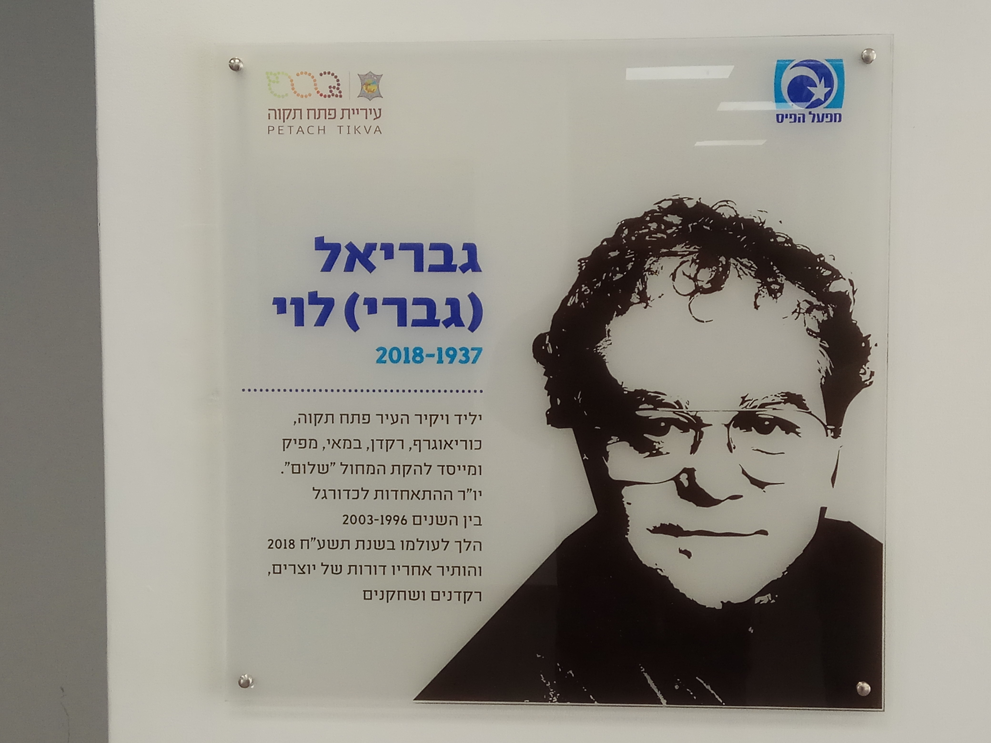 לוחית זיכרון לגברי לוי באולם גולדה, הדר המושבות, פתח תקווה